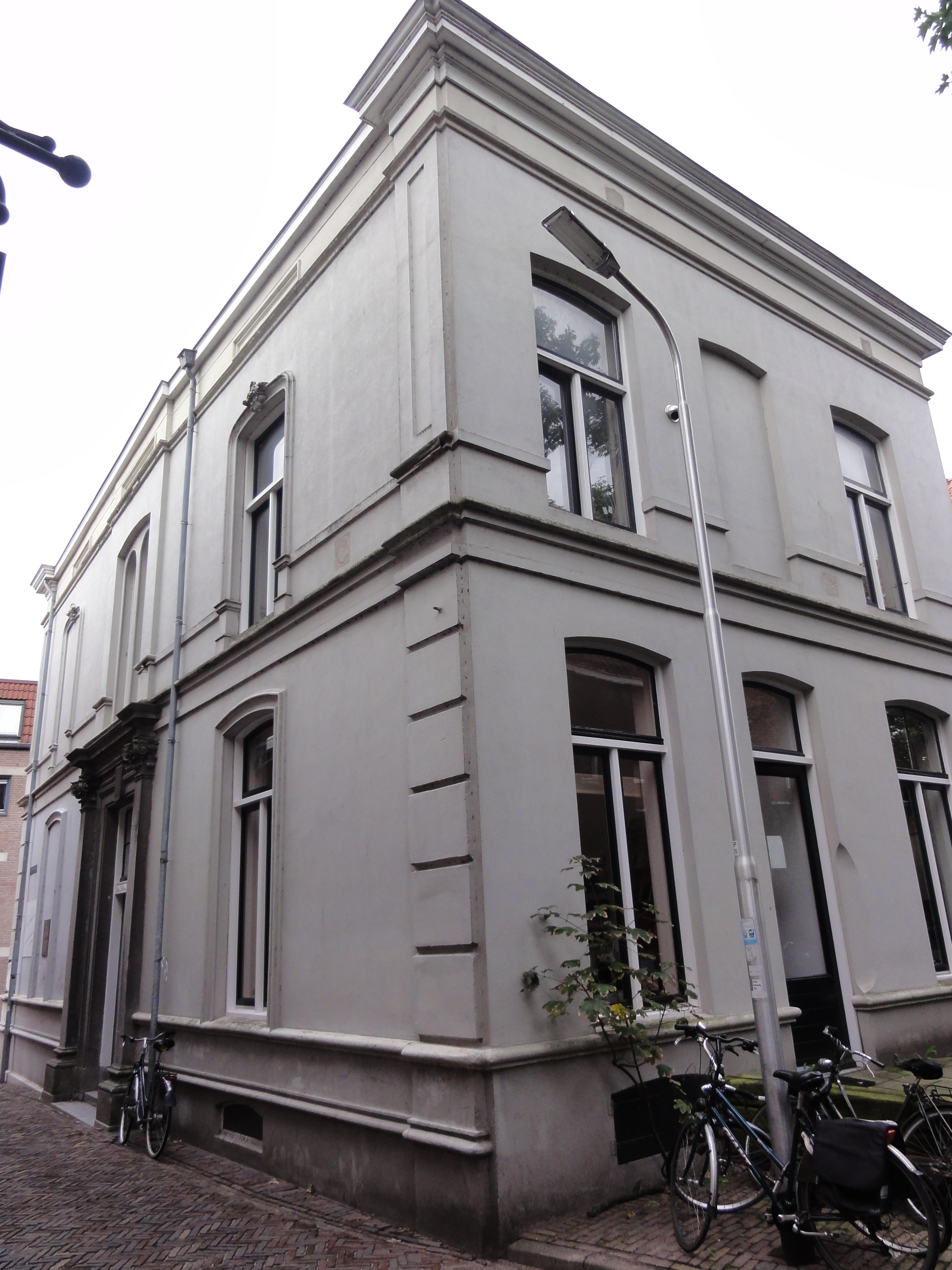 Nijmegen Rijksmonument 3116 7 St.Anthoniusplaats 1, sinds 2012 in gebruik als Roze Huis Nijmegen 31″ N, 5° 52′ 03.13″ E Object location51° 50′ 52.16″ N, 5° 52′ 02.23″ E